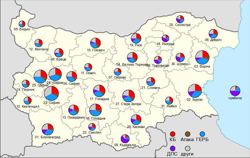 Парламентарни избори в България през 2013: подадени гласове по район